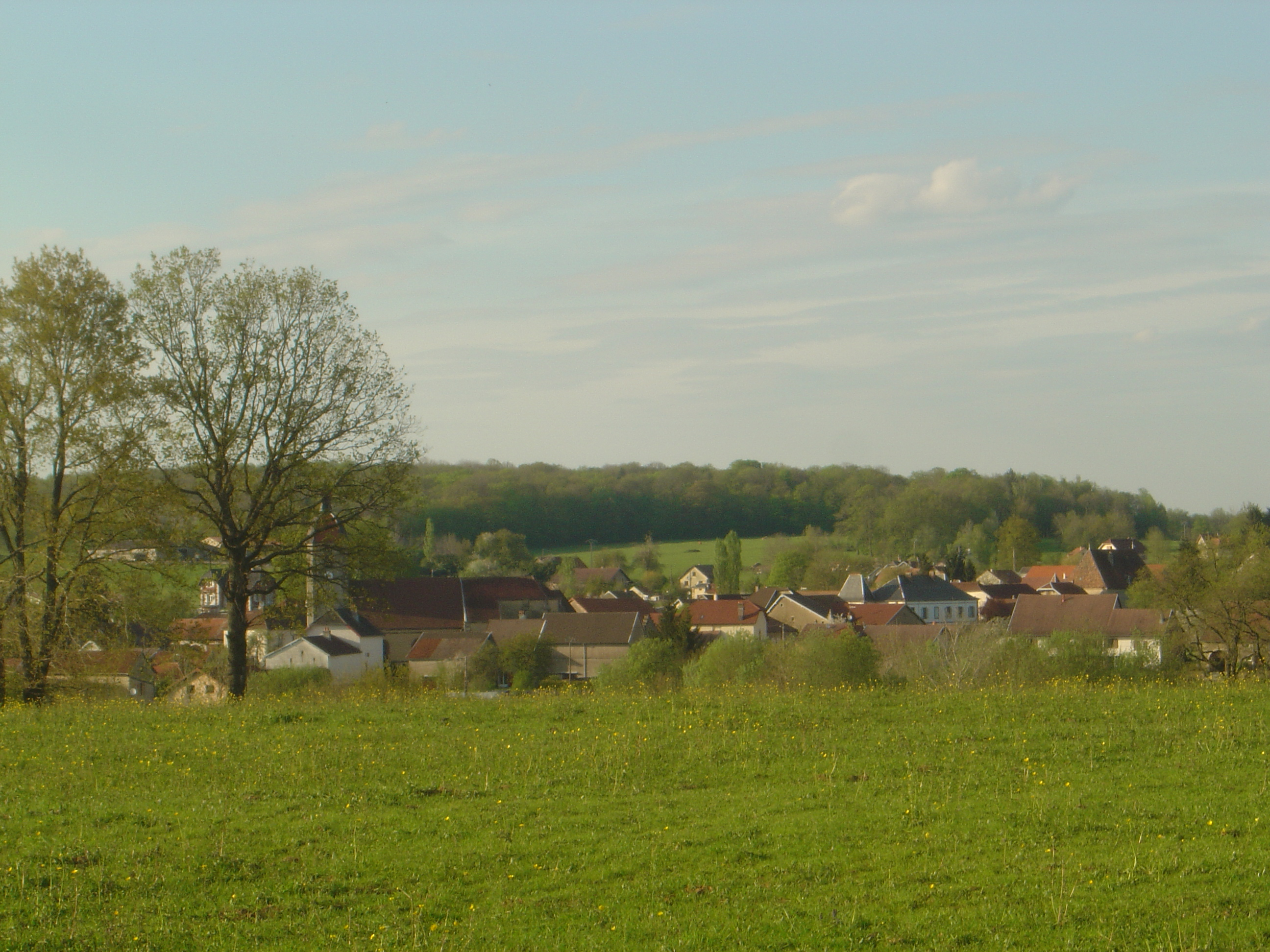 Vue sur Vy lès Lure